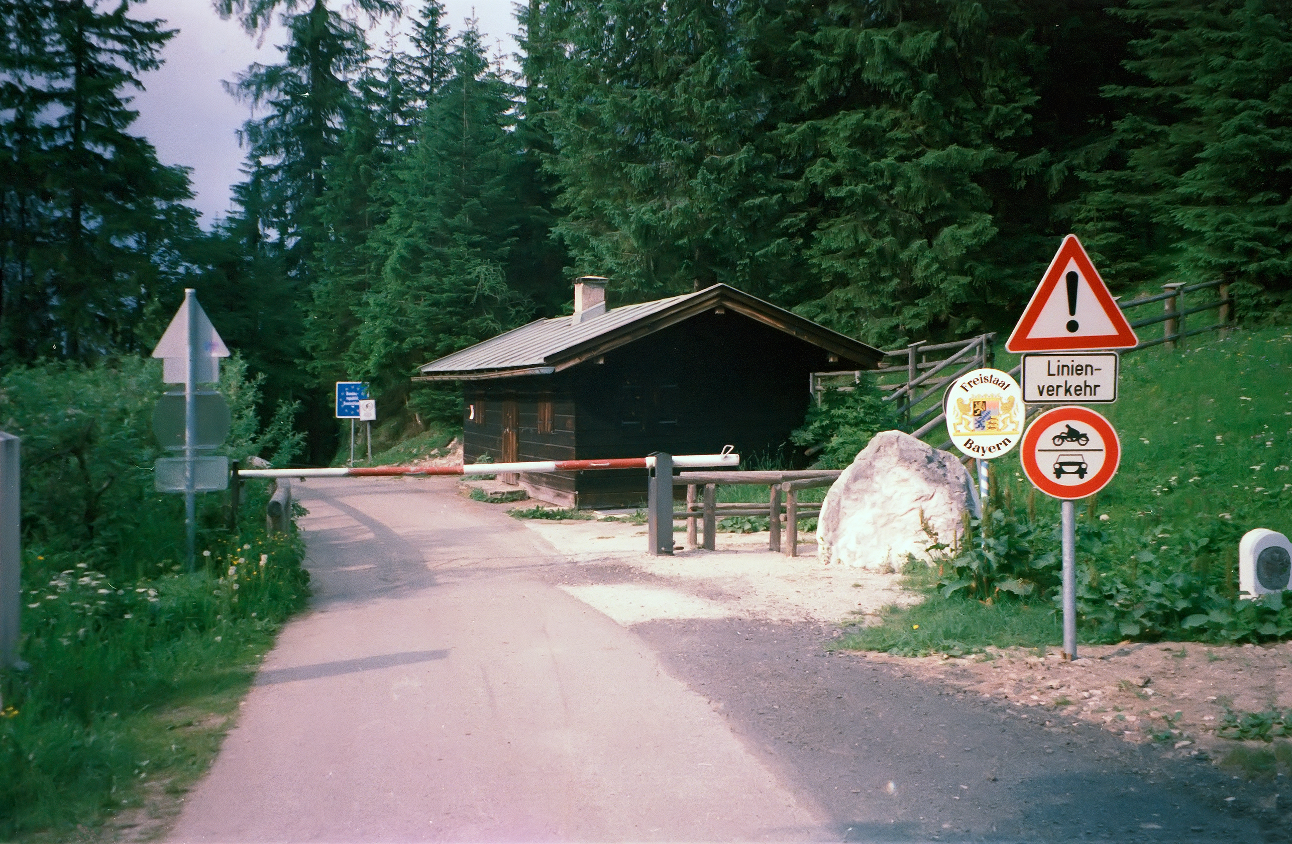 Grenzübergang A→D am Pass Hirschbichl